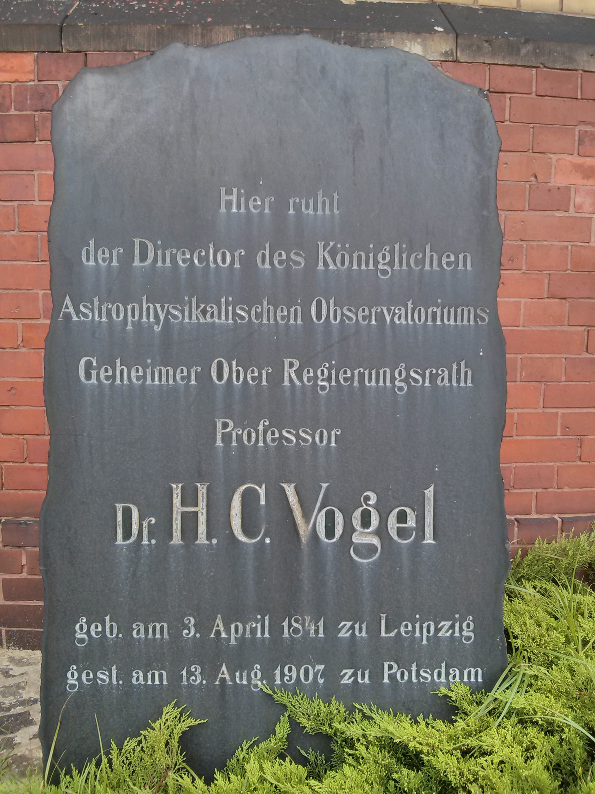 Grabstein von Prof. Hermann Carl Vogel hinter dem großen Refraktor im Einsteinpark, Potsdam